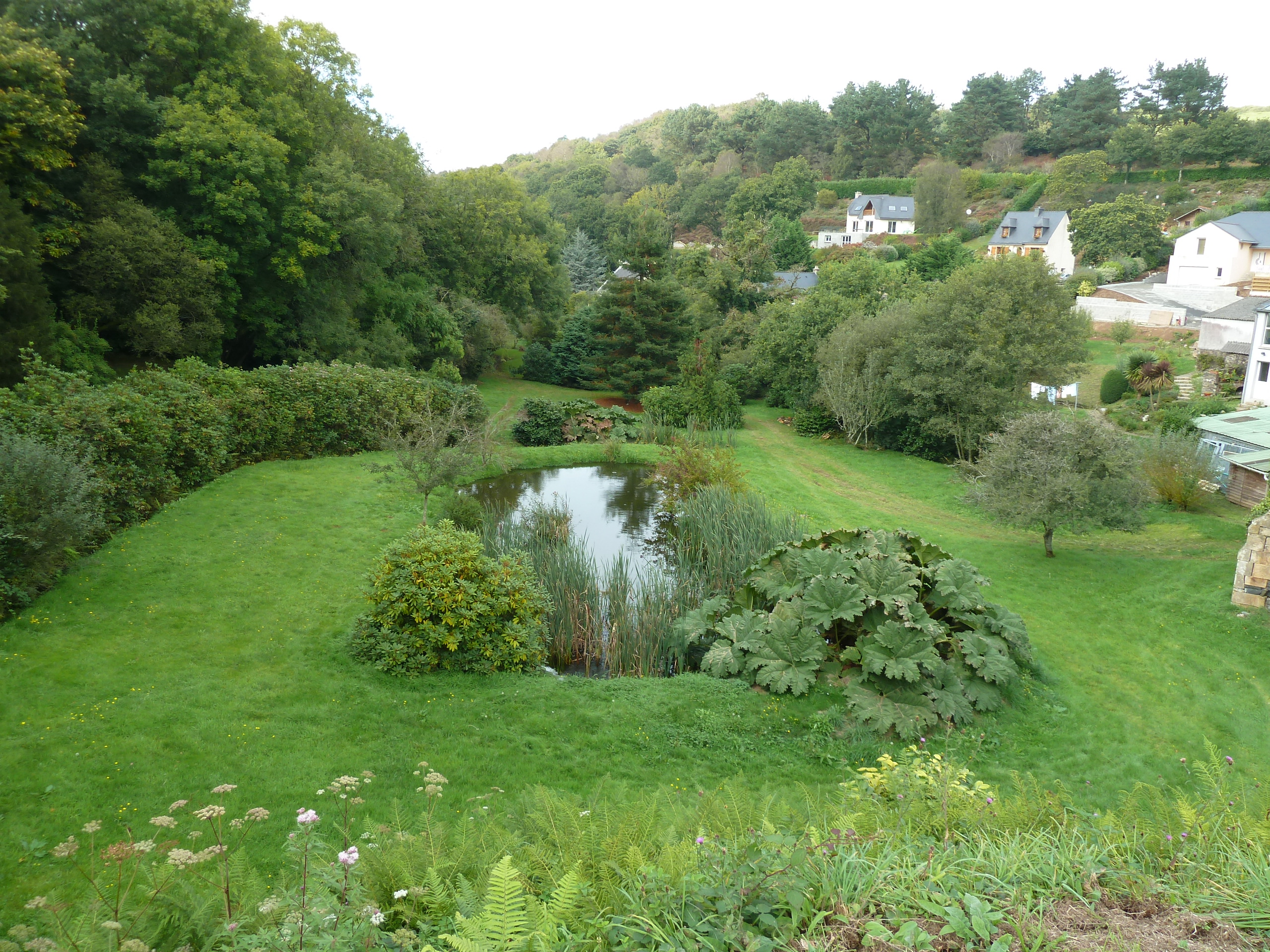 Vue derrrière l'étang du Roual à Dirinon